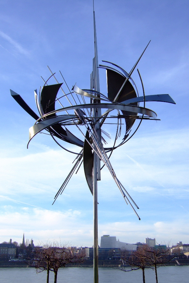 Ernst Günter Hansing: o.T. (1989) Ort: Bonn-Beuel - Rheinufer (Hans-Steger-Ufer) Spender: Klöckner-Moeller-GmbH (anlässlich der 2000-Jahr-Feier der Stadt Bonn) Weblinks Seite des Künstlers